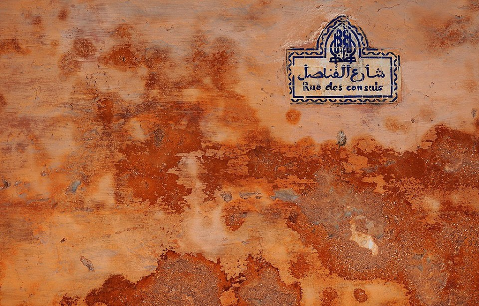 Rue des consuls